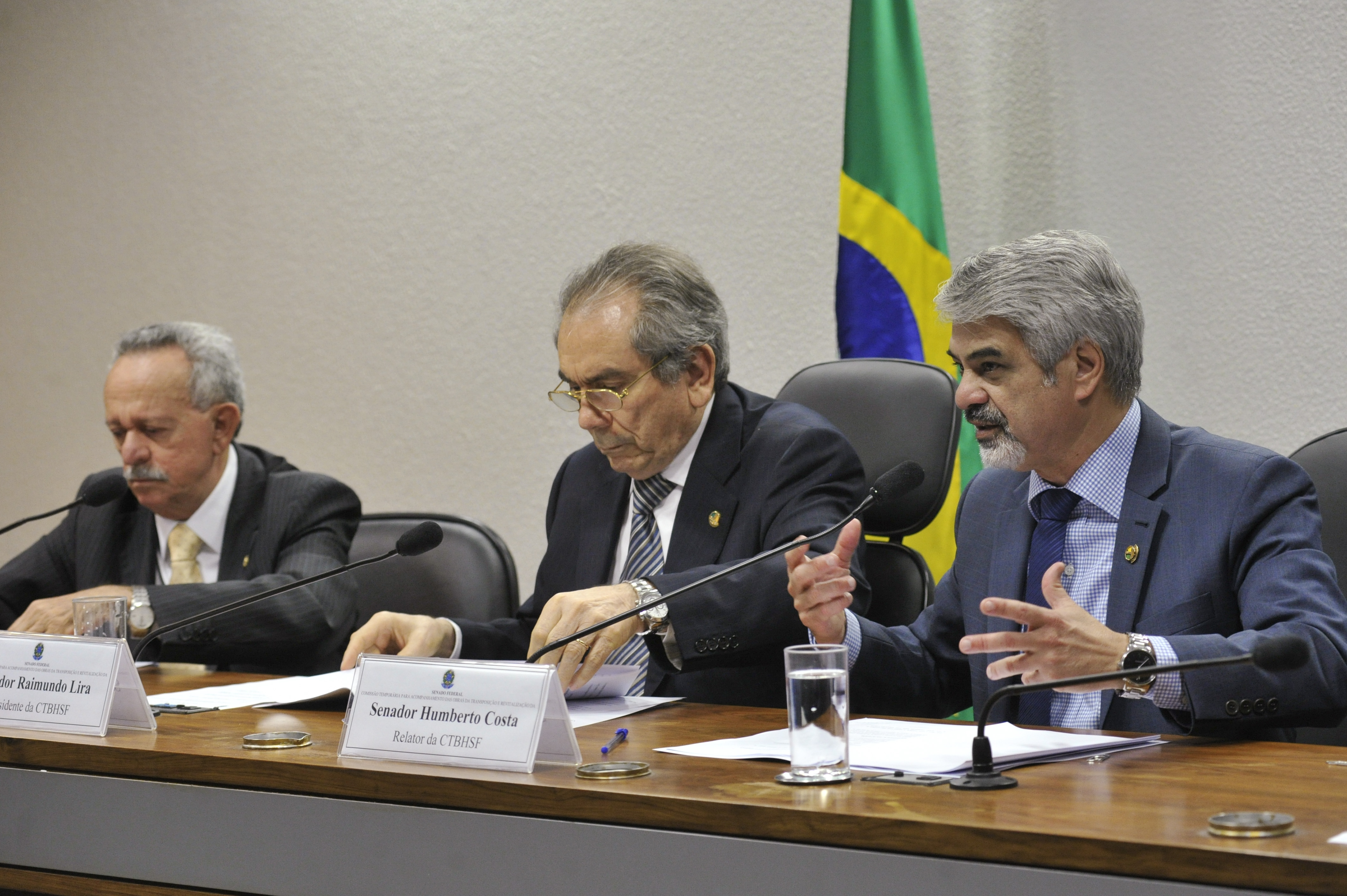 Sala de comissões do Senado durante a Comissão Temporária para Acompanhamento das Obras da Transposição e Revitalização da Bacia Hidrográfica do Rio São Francisco (CTBHSF) que realiza reunião de trabalho para eleição do vice-presidente e apreciação do plano de trabalho. (E/D): vice presidente da CTBHSF, senador Benedito de Lira (PP-AL); presidente da CTBHSF, senador Raimundo Lira (PMDB-PB); relator da CTBHSF, senador Humberto Costa (PT-PE). Foto: Geraldo Magela/Agência Senado